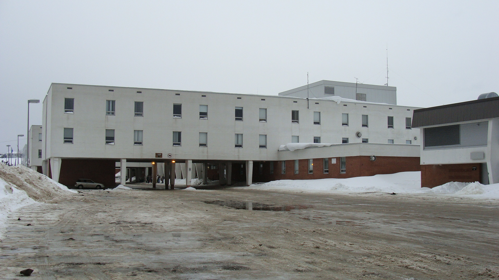 Polyvalente de La Baie, au Saguenay (Québec, Canada).